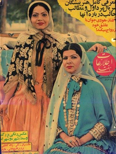 سریال مرد اول